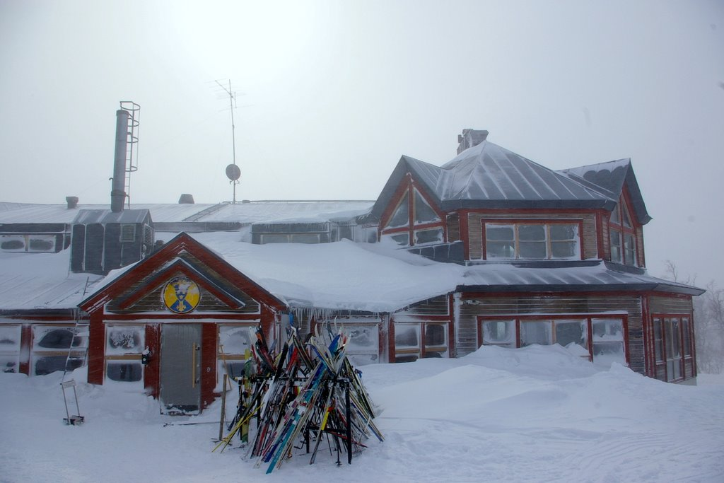 Stolrulvån fjällstation